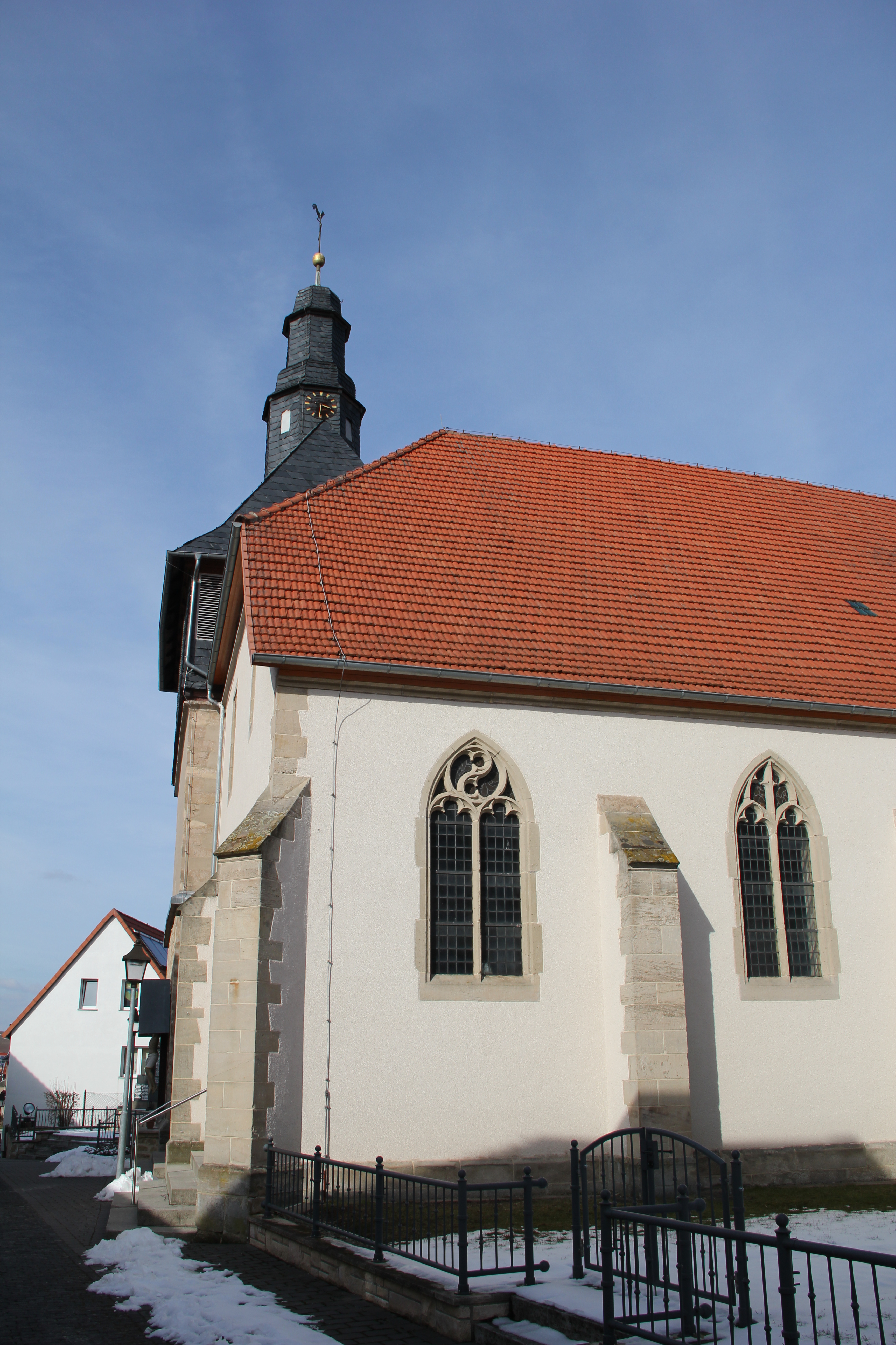 Sankt-Johannes-der-Täufer-Kirche in Jützenbach